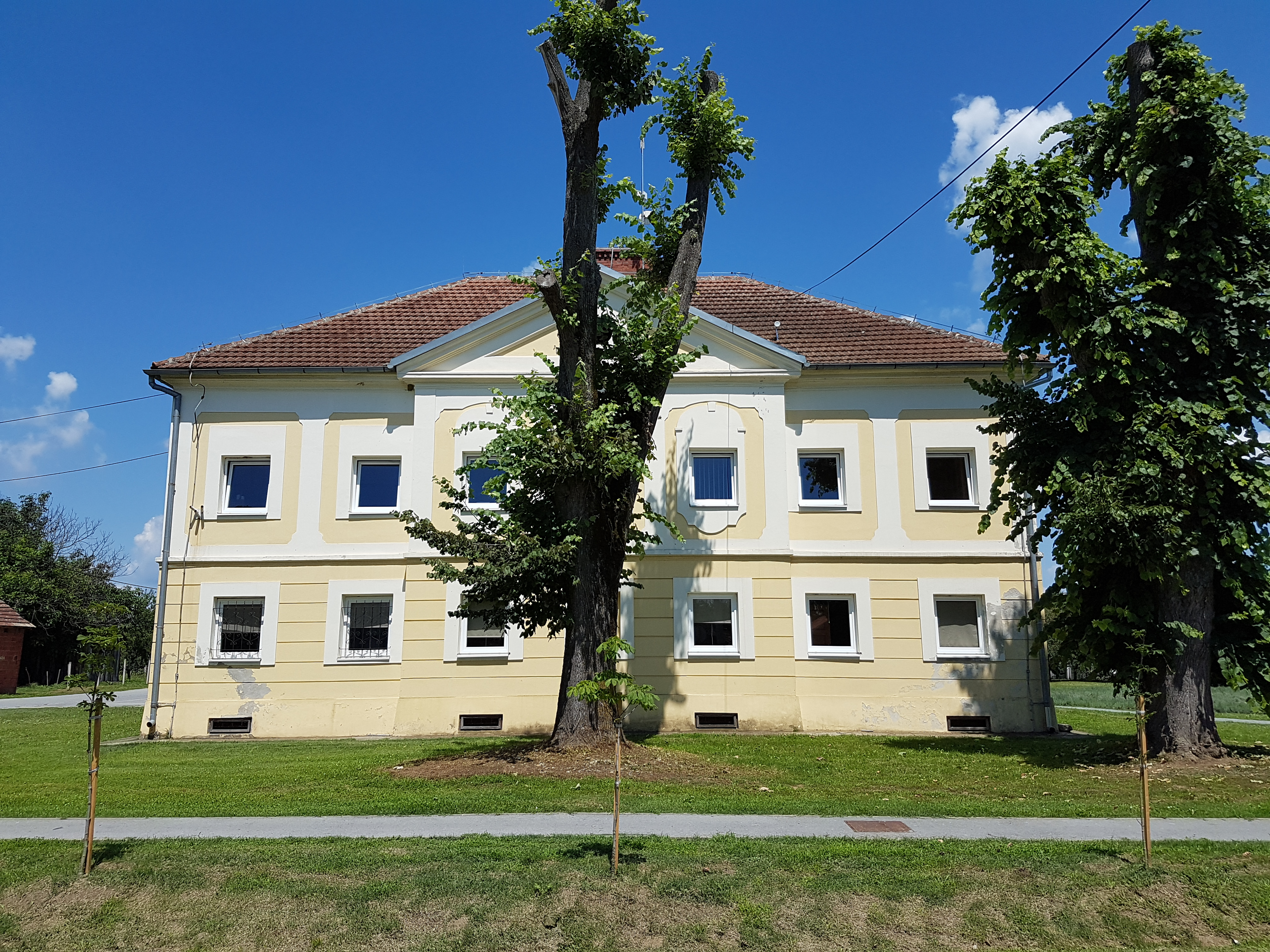 Dvorac kurija Špišić u Špišić Bukovici